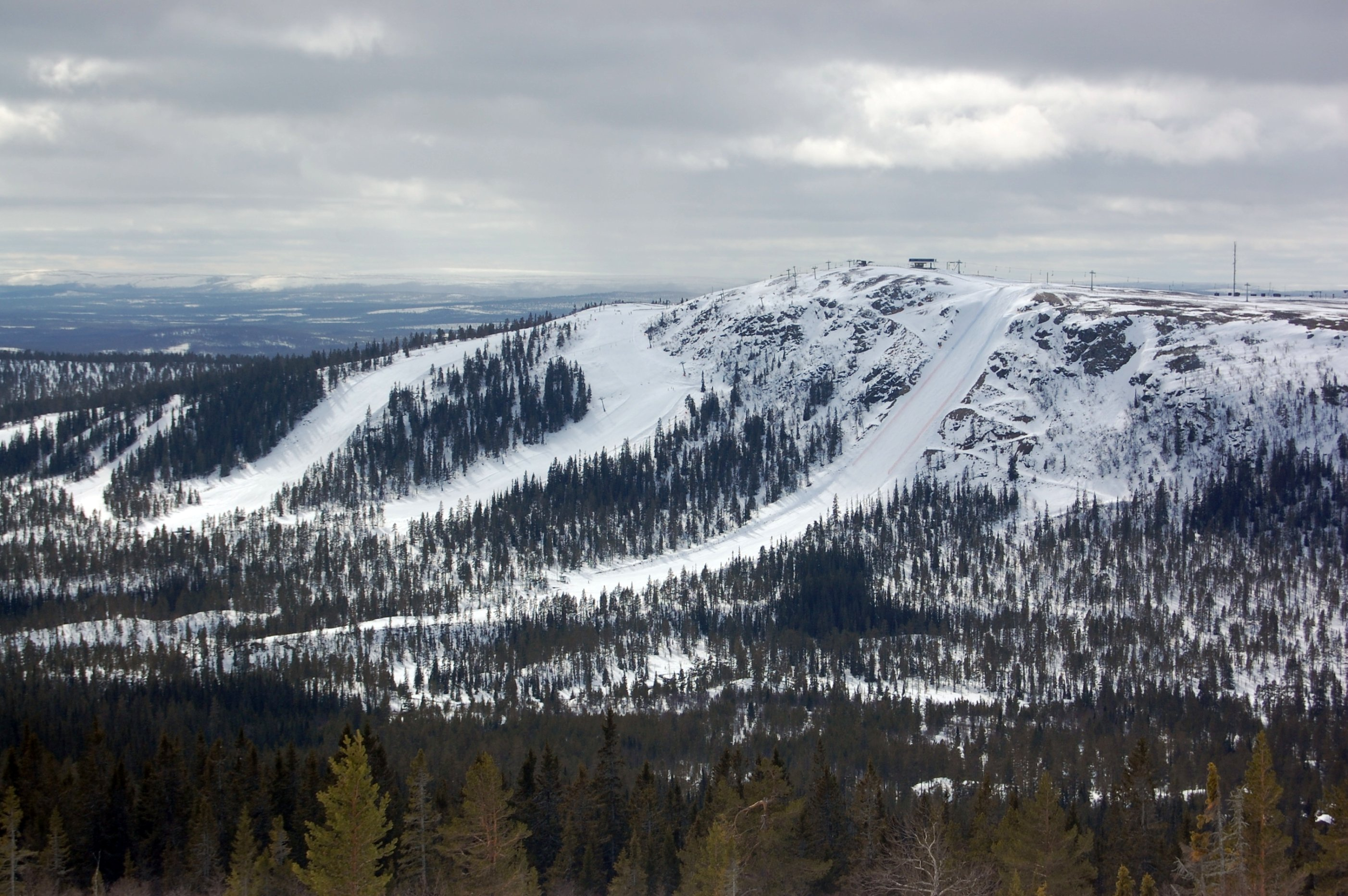 Idrefjell alpin